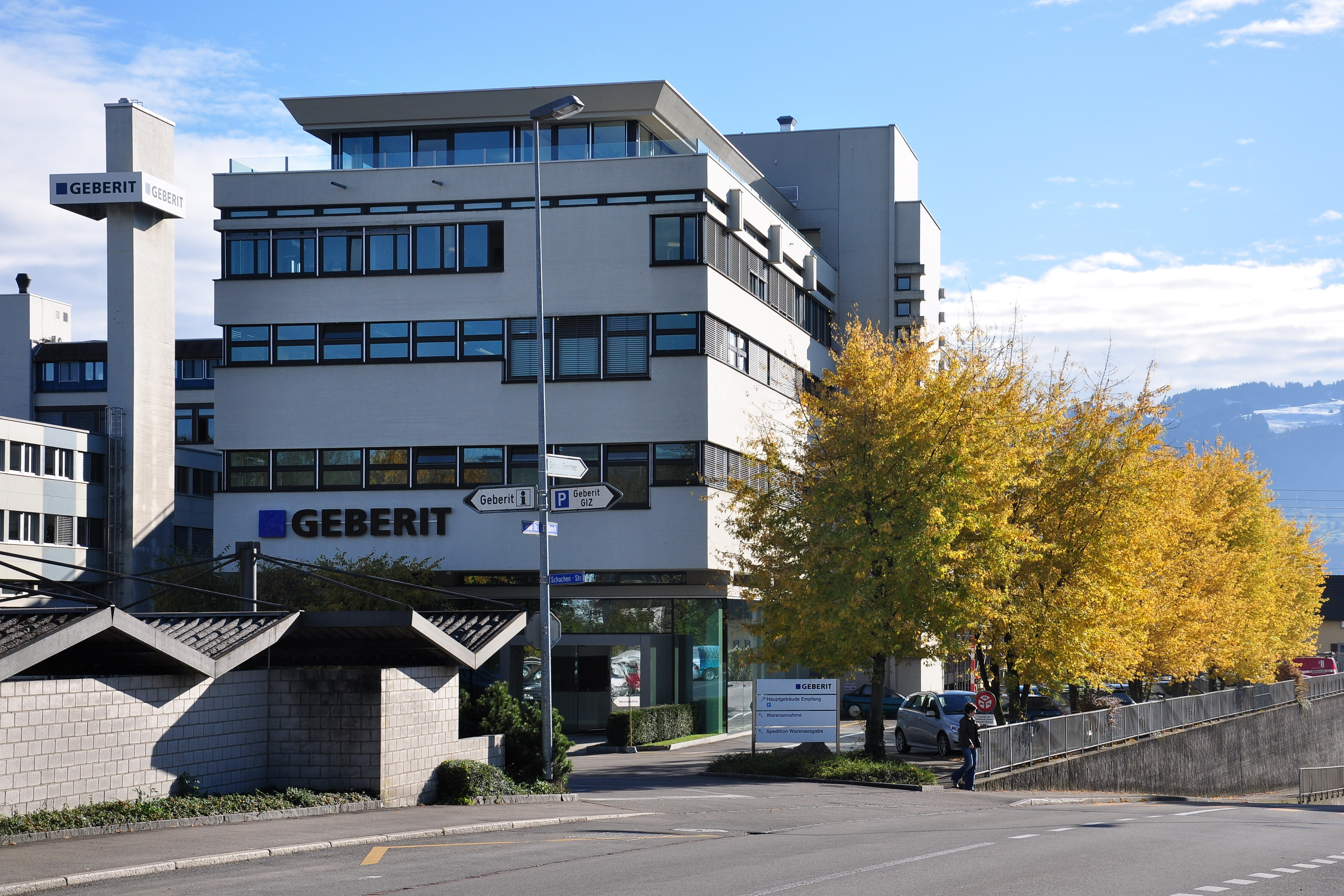 Geberit building in Jona (SG)